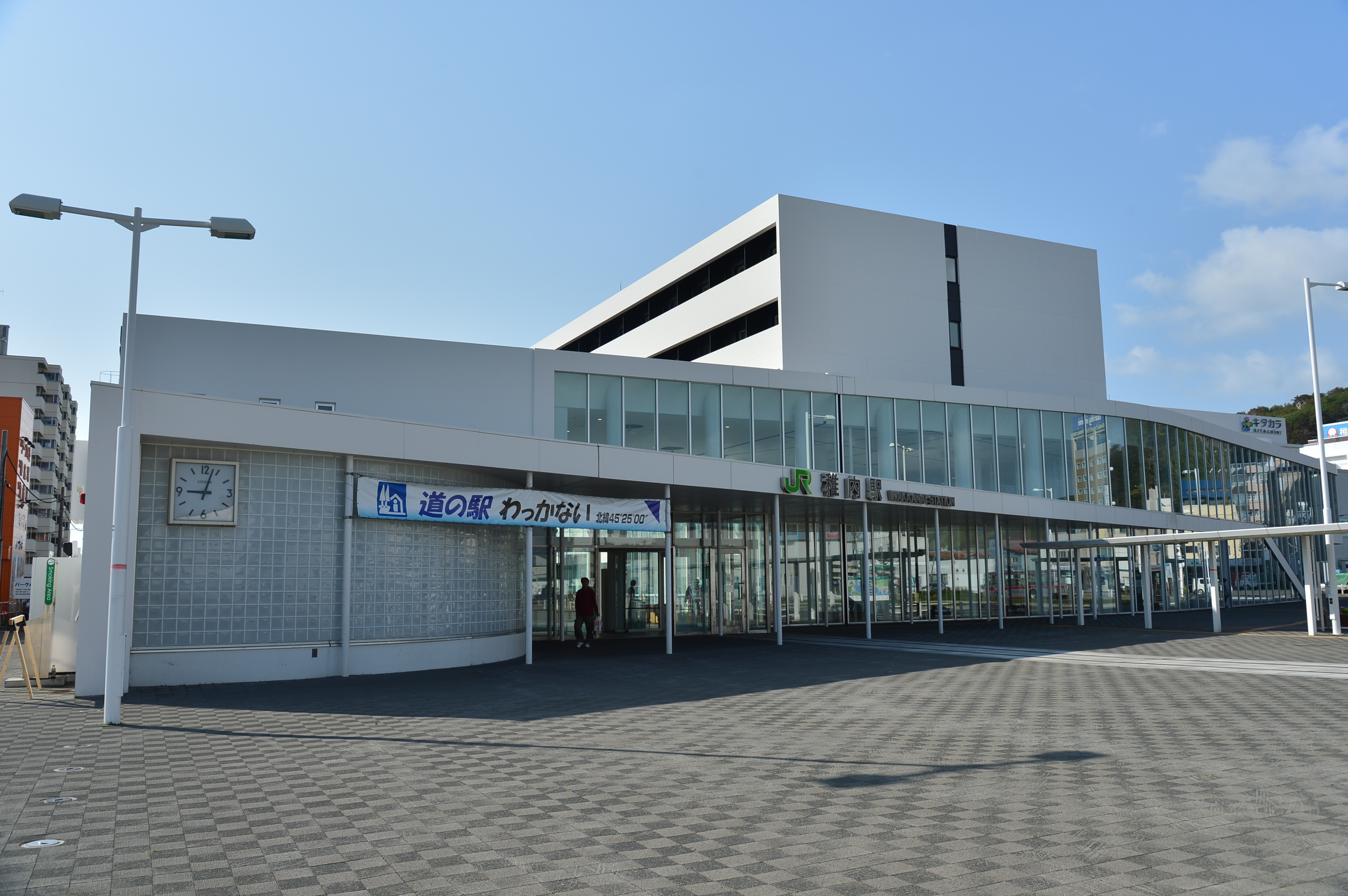 JR稚内駅（駅ビル「キタカラ」）